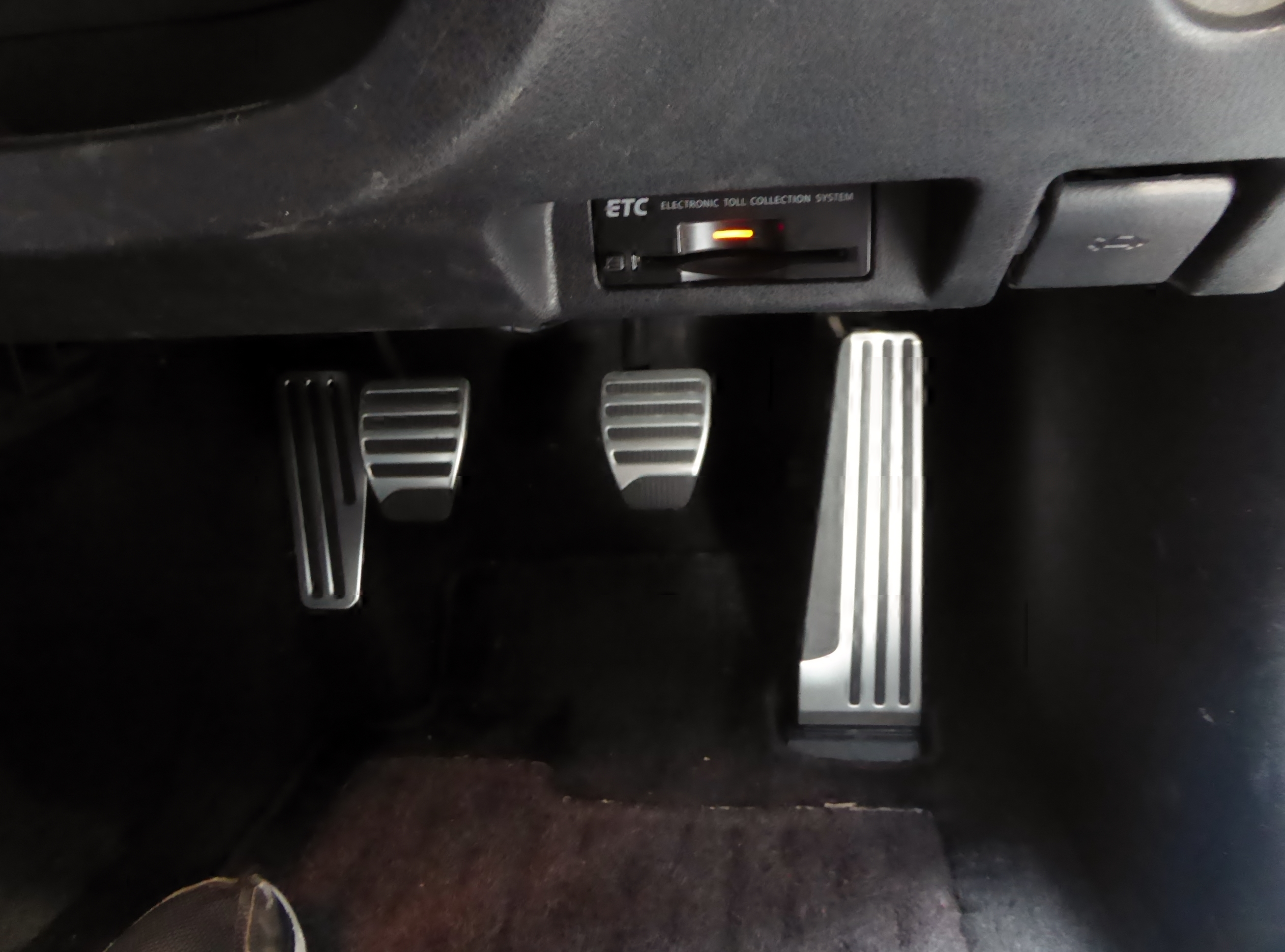 CBA-Z34型日産・フェアレディZニスモのペダル類を撮影。